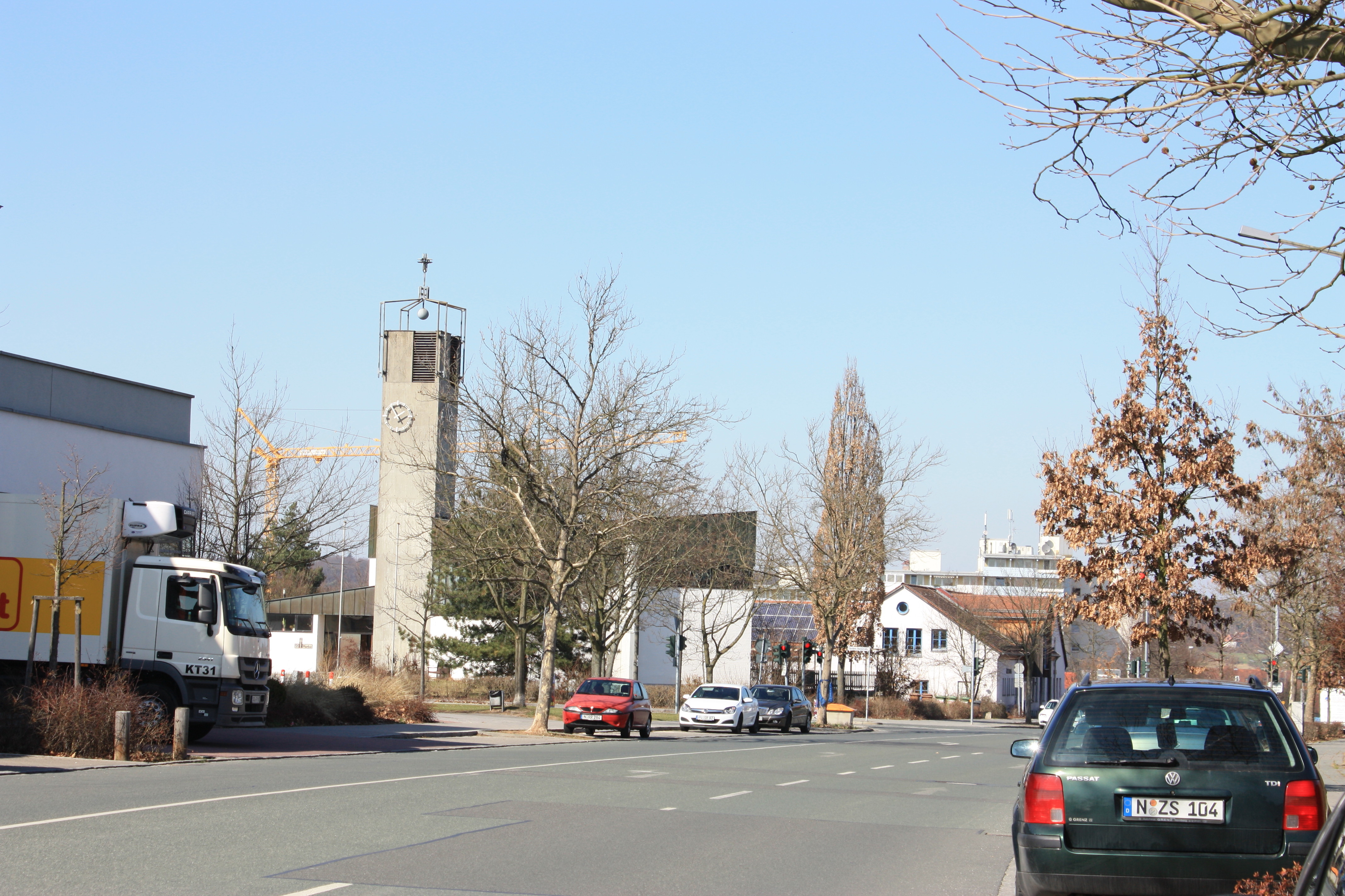 Oberasbach OT Altenberg, evangelisch-lutherische Pfarrkirche St. Markus